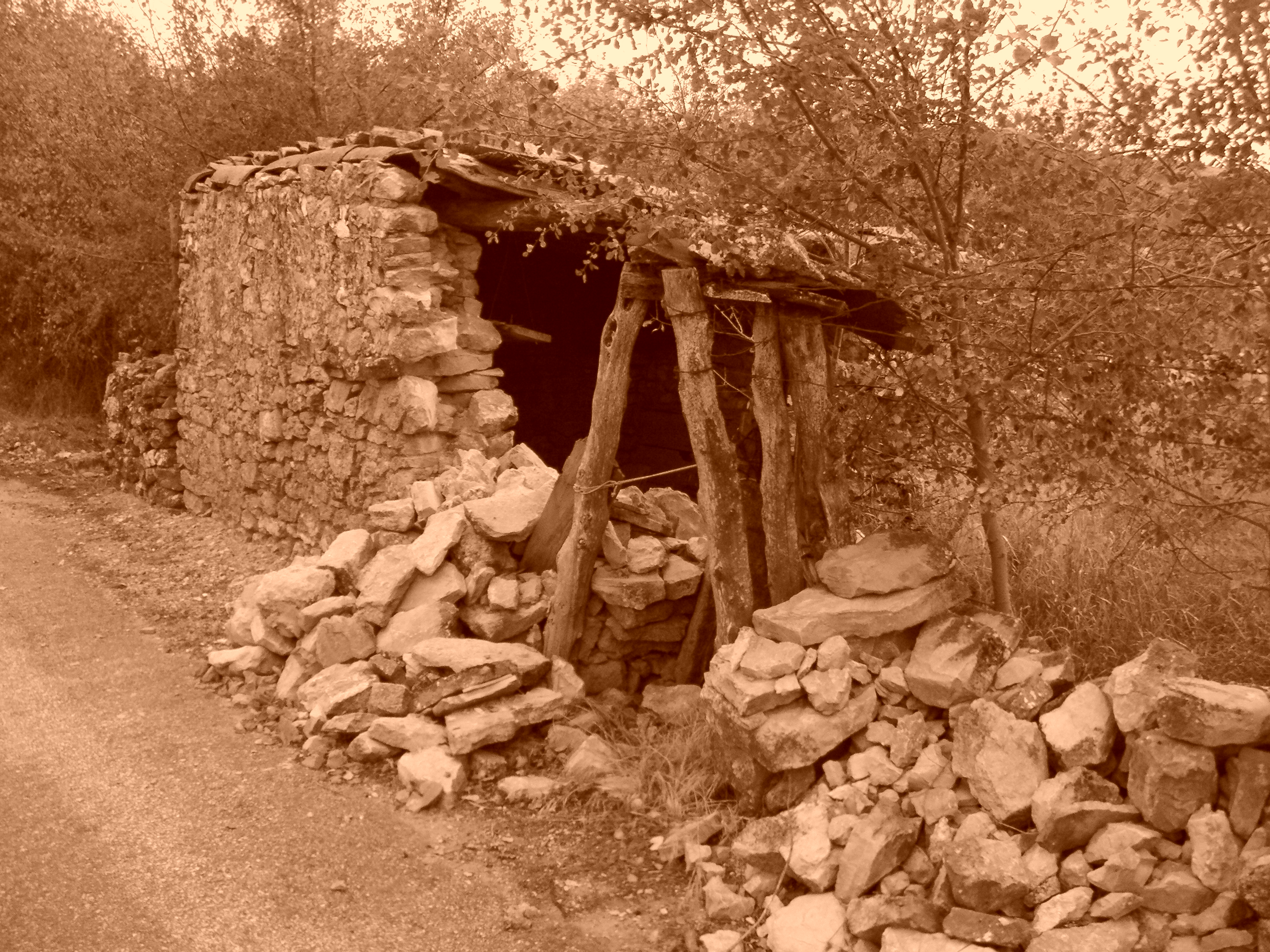 Tipico cobertizo de labradores, en Las Fraguas (Soria)